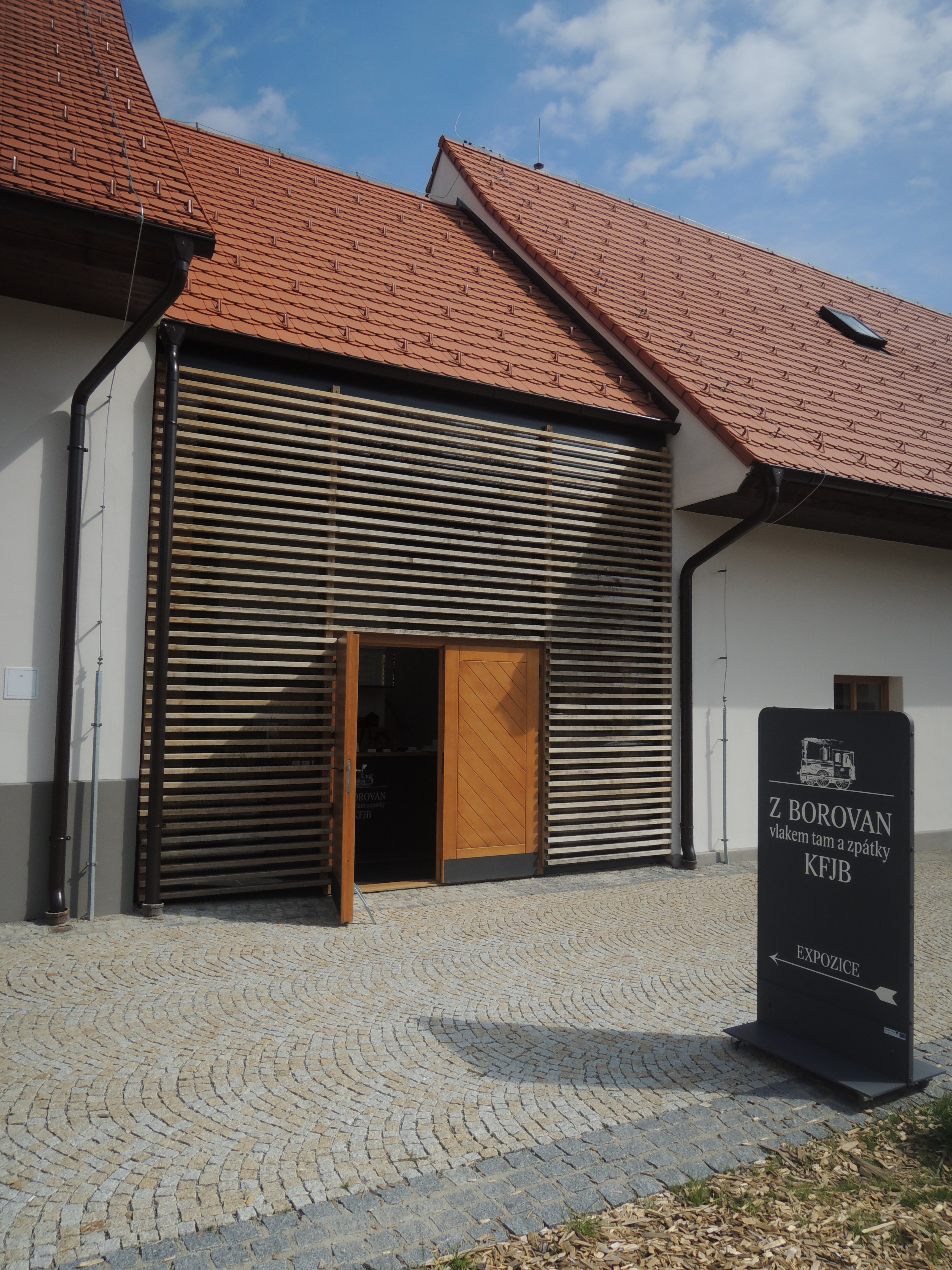 Eingang zur Ausstellung